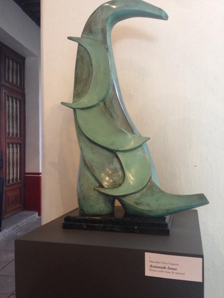 Escultura hecha por Mercedes Ortiz Vaquero, al interior de casa Risco, San ángel , CDMX